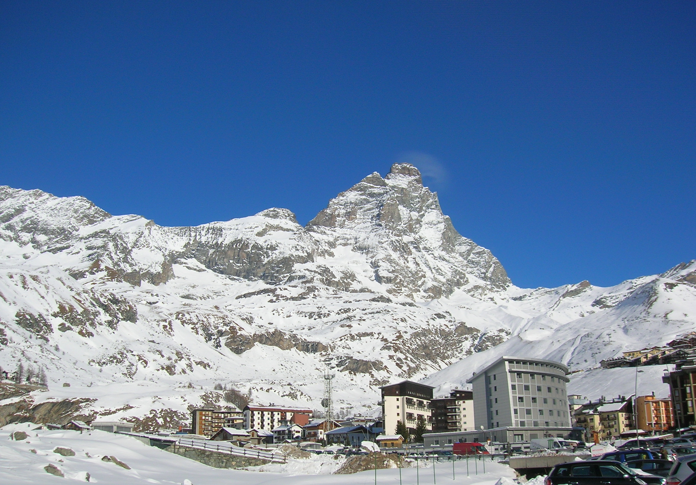 Cervino visto da Breuil Cervinia, Valle d'Aosta, Italia. This is a photo of a monument which is part of cultural heritage of Italy.